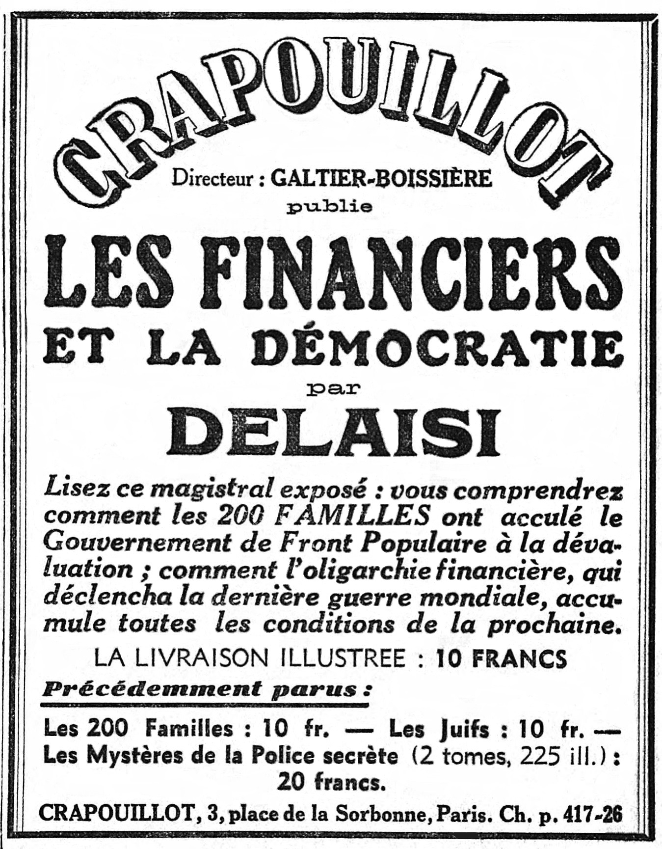 Encart publicitaire dans le journal Le Populaire relatif à la publication de Francis Delaisi, Les financiers et la démocratie.